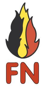 Logo der Partei Front National